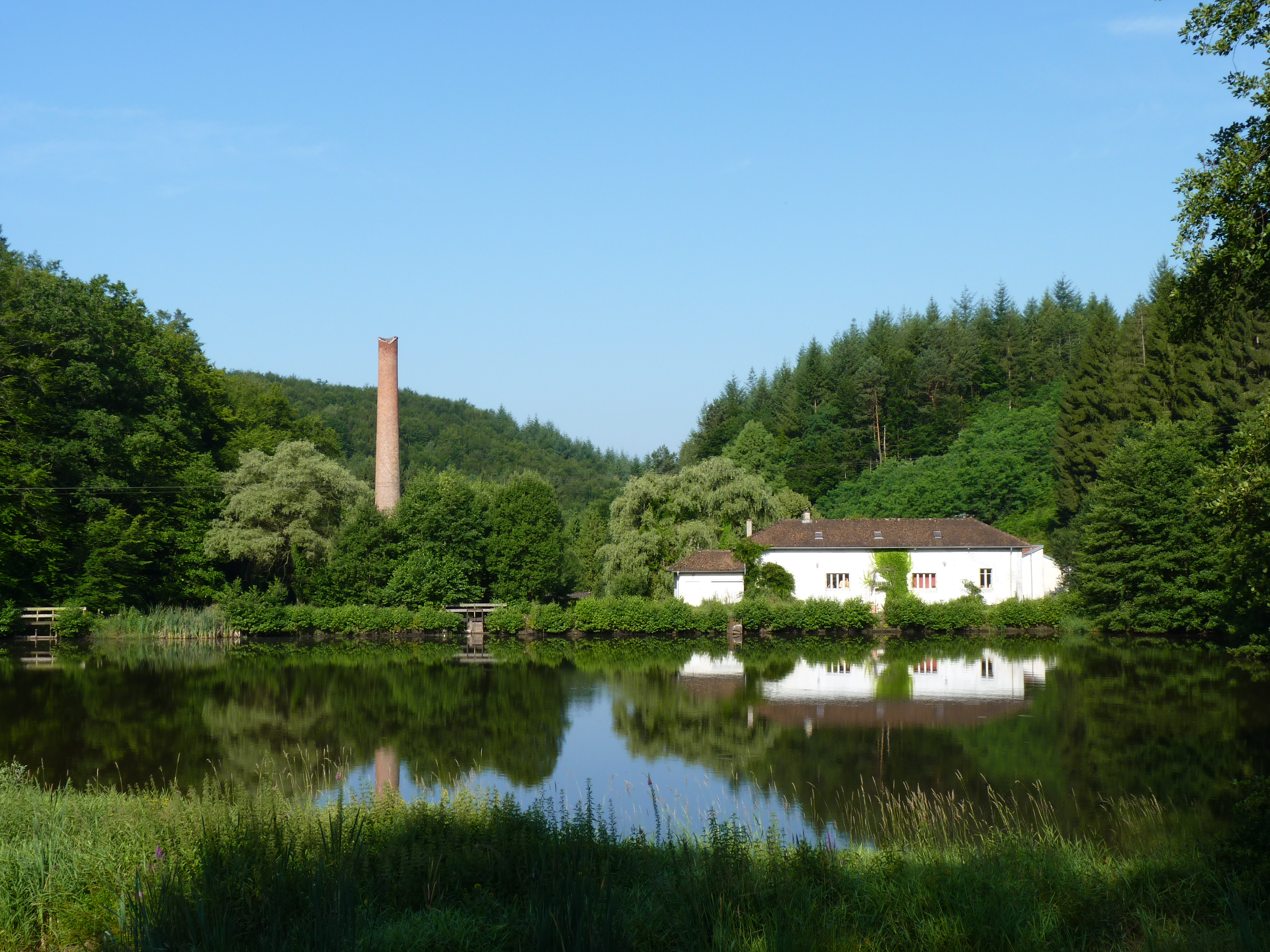 Template:Forge Neuve